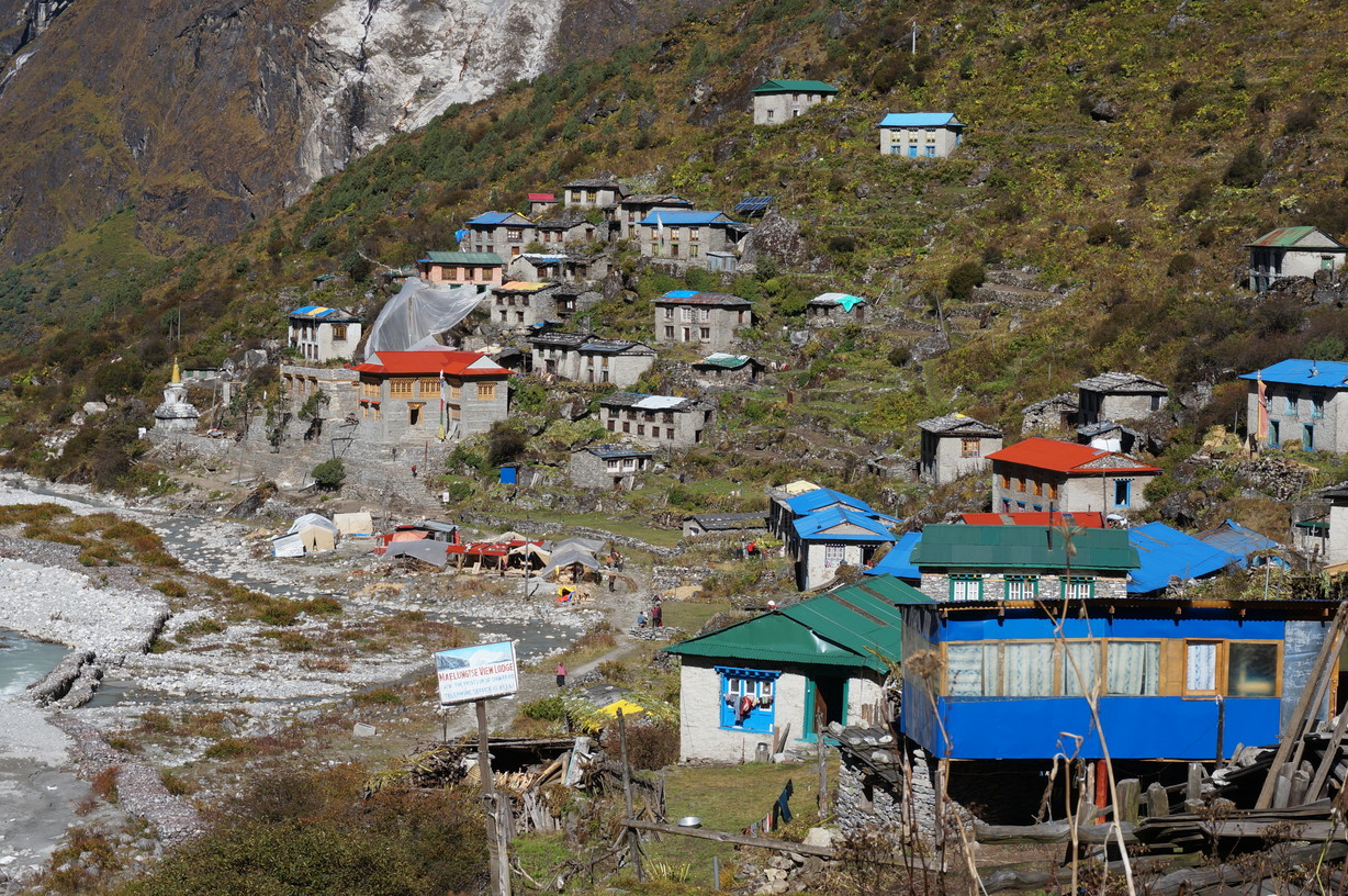 Die Sherpa-Siedlung Beding mit Kloster im Rolwalingtal, Rolwaling Himal, Nepal, Himalaya